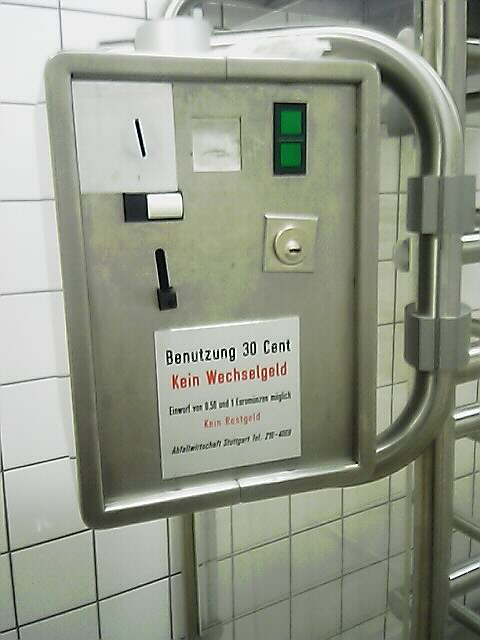 Zugangsautomat vor der Herrentoilette des Hbf Stuttgart, eigenes Foto, 31.07.2005.